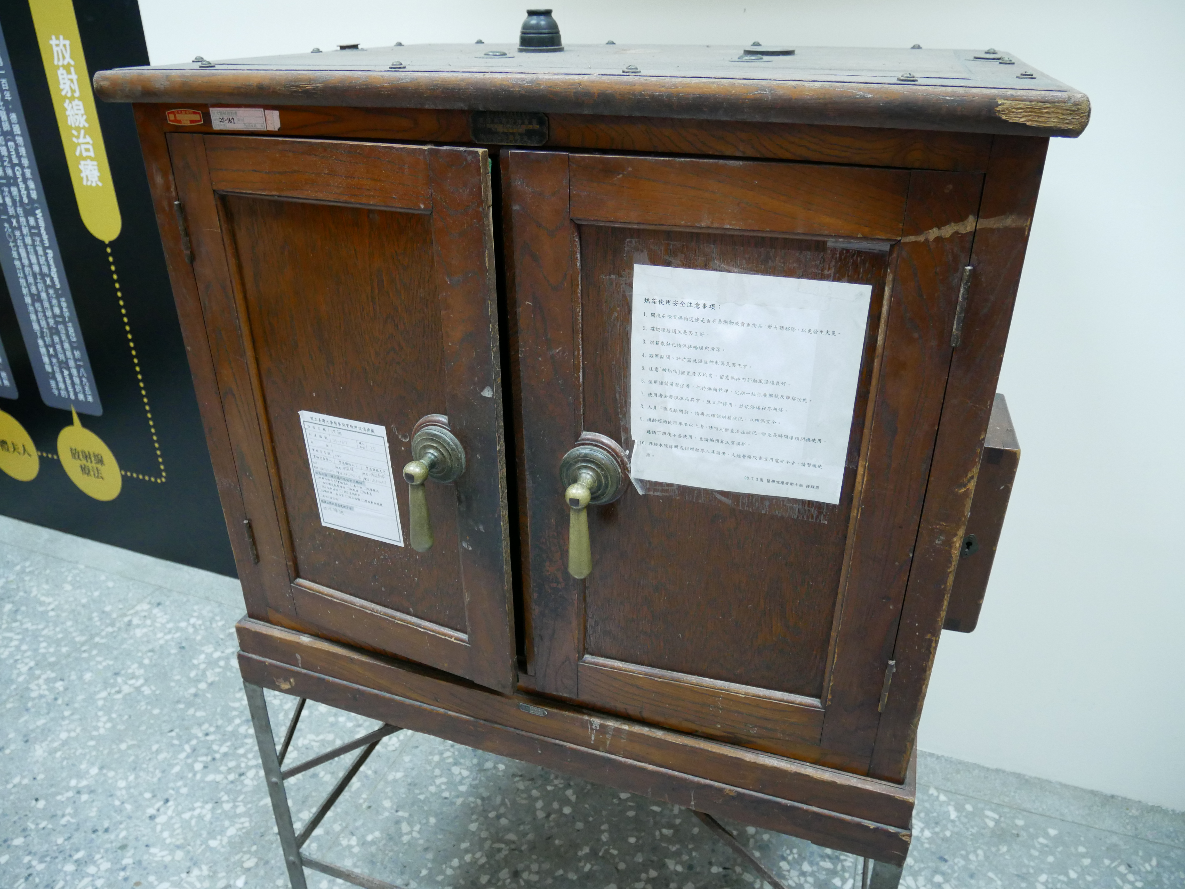 中文（台灣）: 國立臺灣大學醫學人文博物館所藏烘箱，臺北市中正區東門次分區東門里